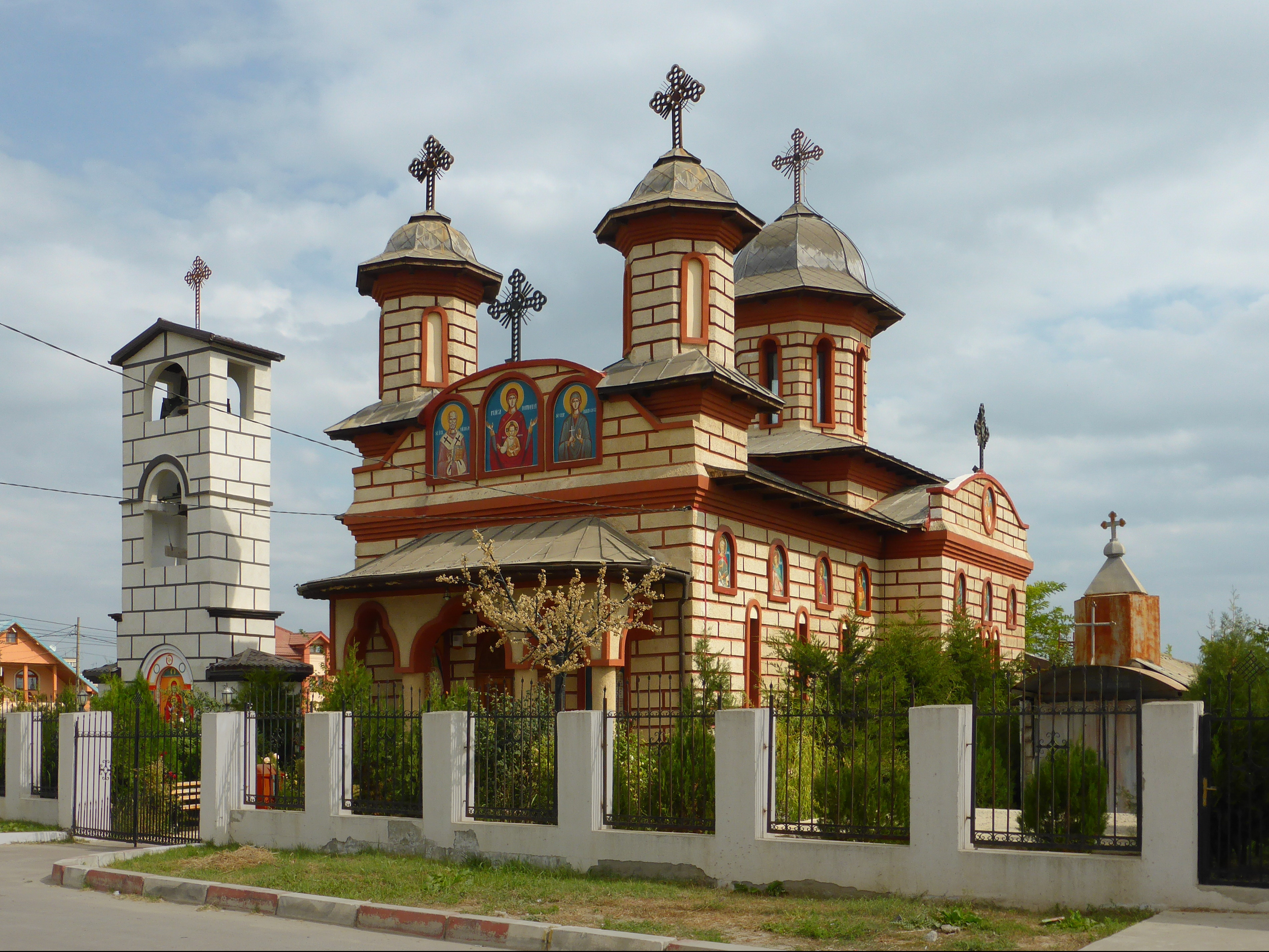 Die orthodoxe Kirche des Dorfes Mamaia (zu Năvodari im Kreis Konstanza gehörig).